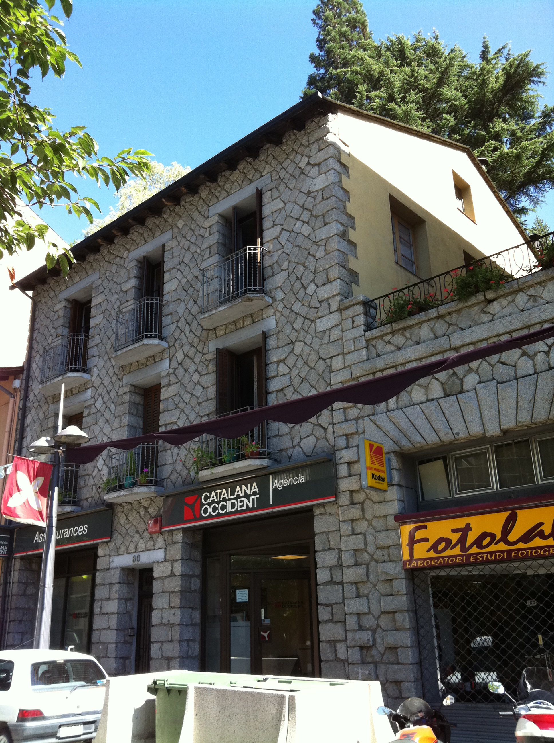 Casa Bonet